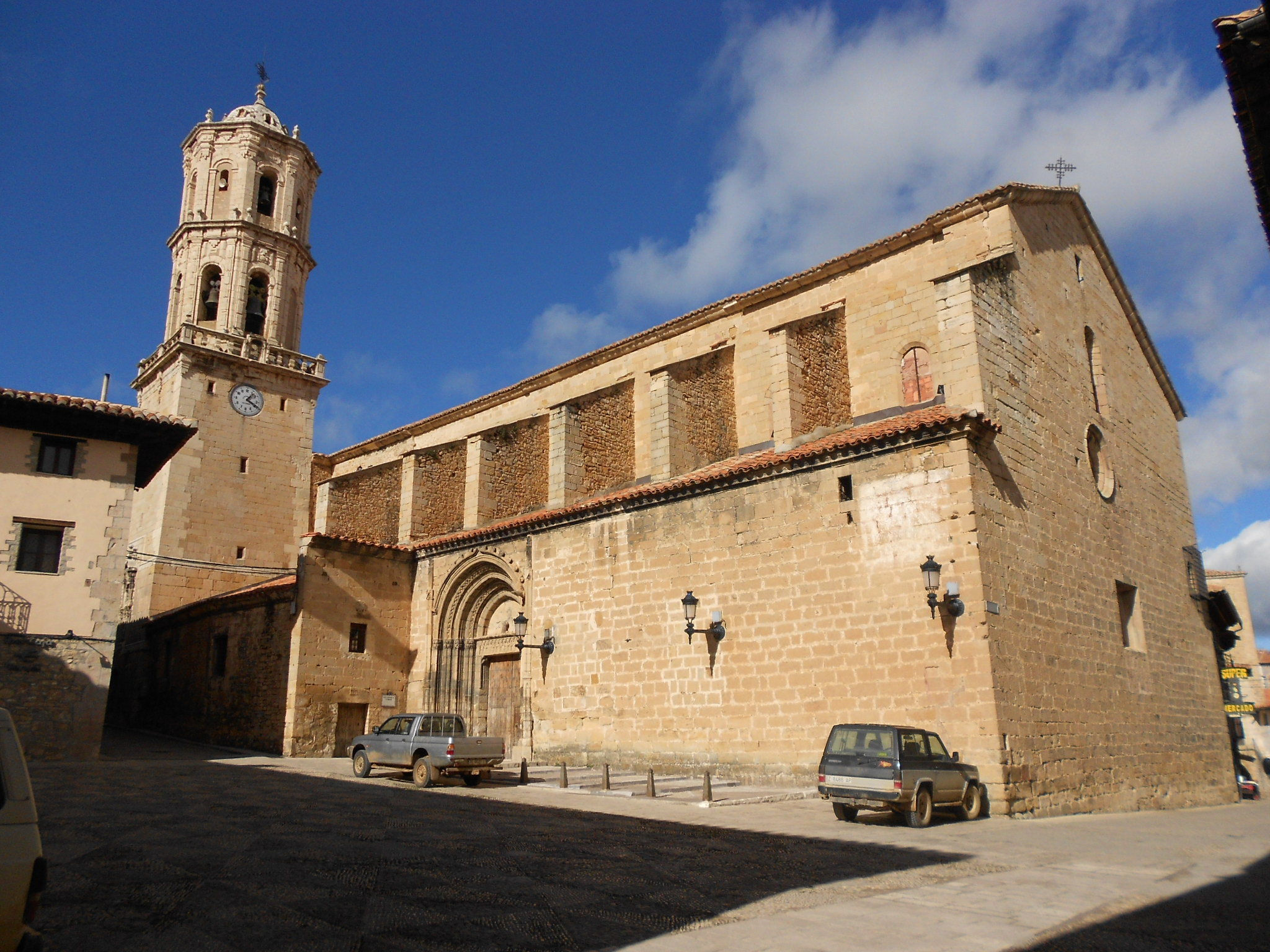 Iglesia de Nuestra Señora de la Asunción (Mosqueruela, España)